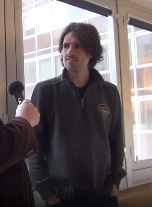 Florent Castelnérac - 2013 - Interview Playitlive.fr